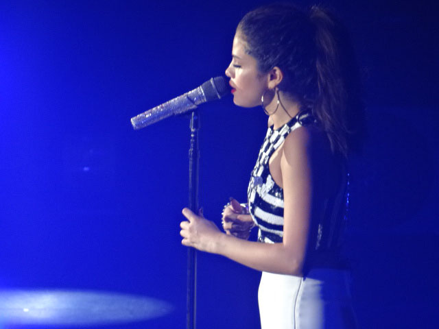 Stars Dance Tour - 04 septembre 2013.